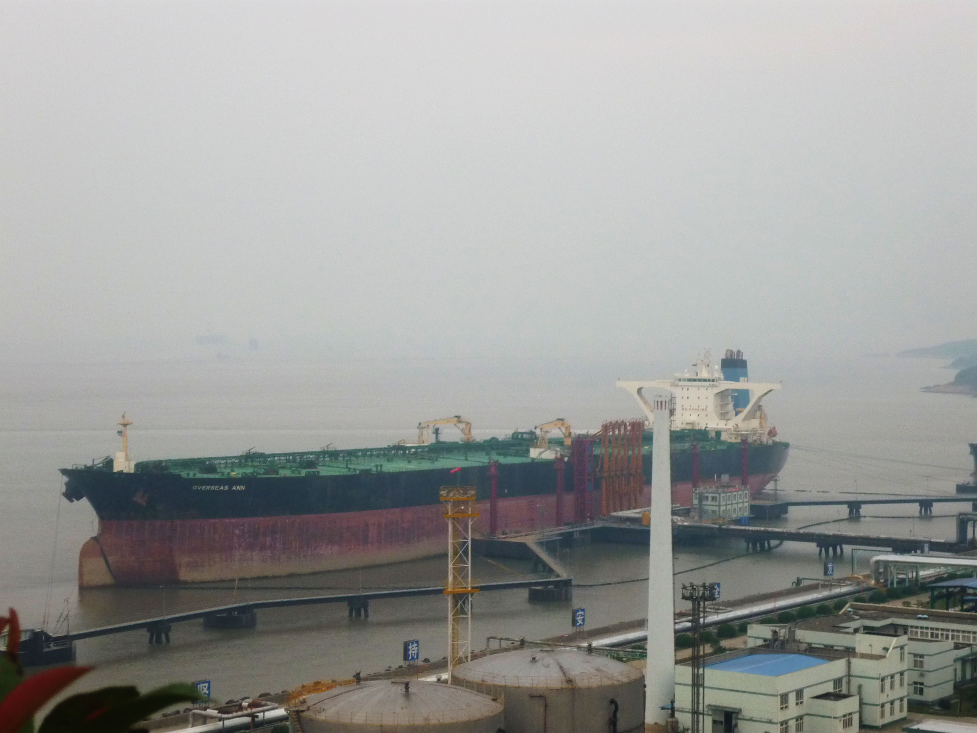 北仑大榭原油码头